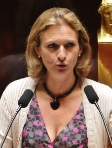 Intervention d'Isabelle Vasseur, Député de l'Aisne, à la tribune de l'Assemblée Nationale.